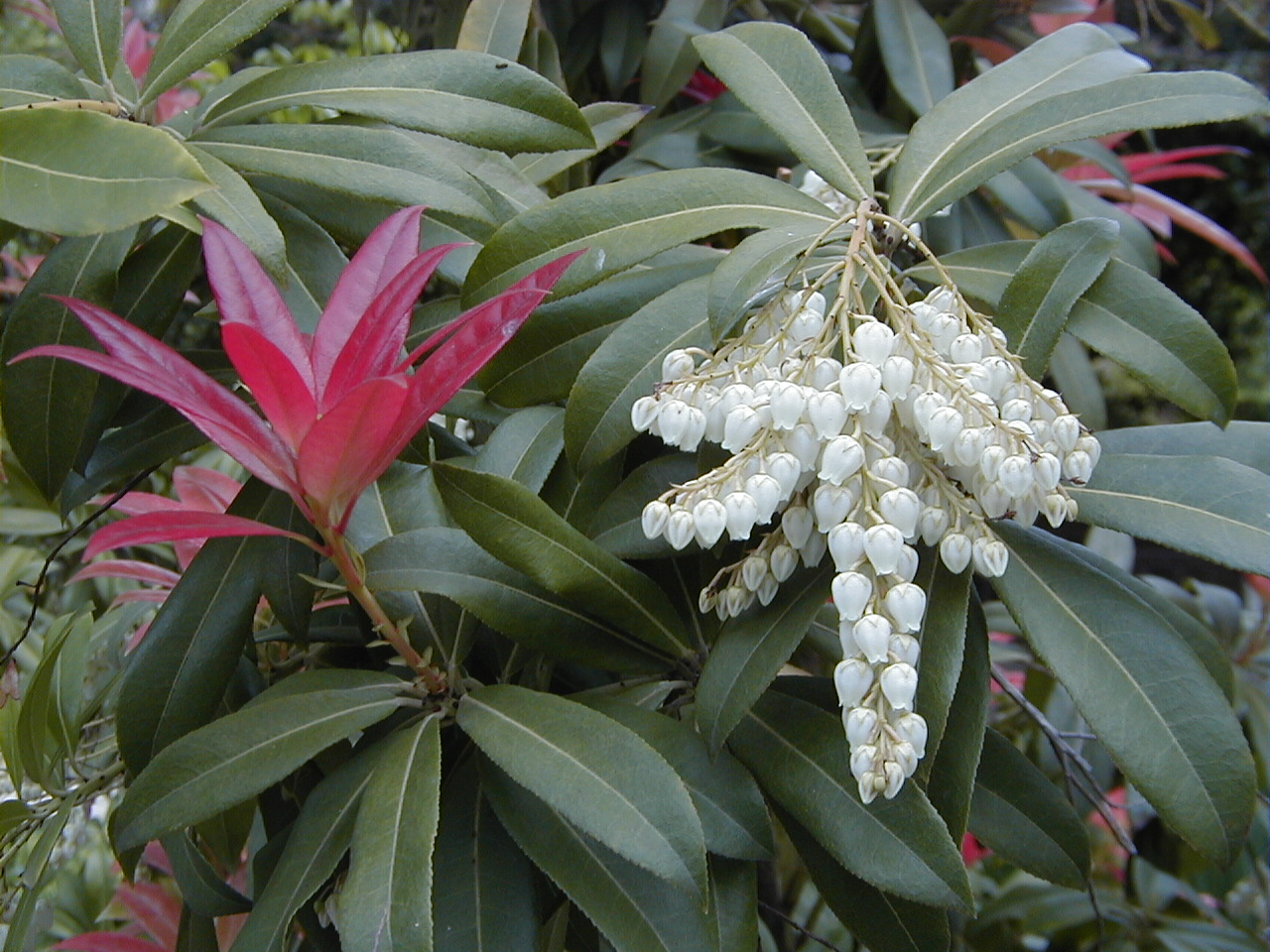 Pieris formosa 'Wakehurst'. Real Jardín Botánico, Madrid.